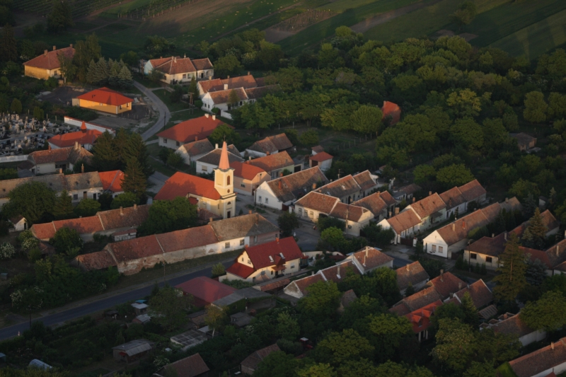 Sarród (Győr-Moson-Sopron megye)